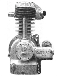 1928 herausgebrachter 500-ccm-Königswellen-Motor von Franz Bartisch